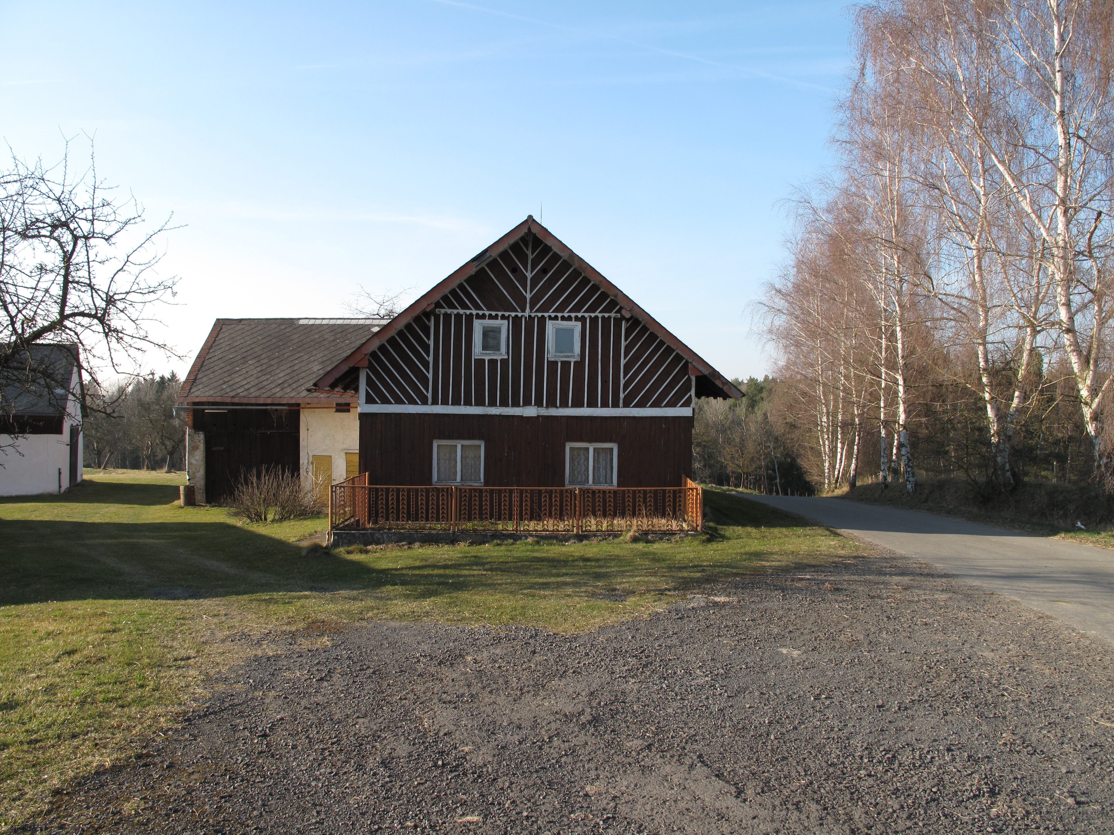 Chalupa v Nantiškově. Okres Liberec, Česká republika.